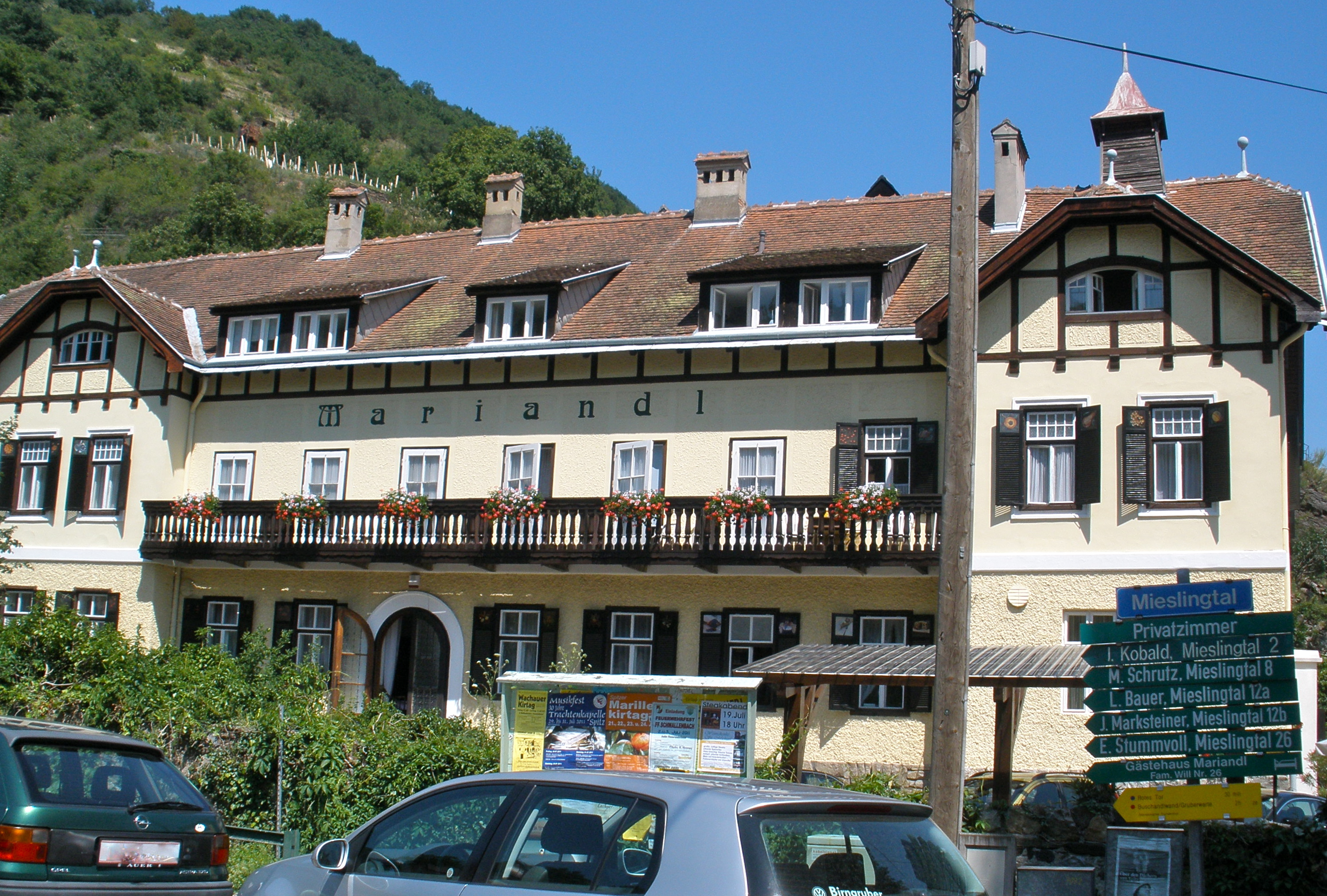 Das Hotel Mariandl in Spitz in der Wachau war Drehort des berühmten Films "Mariandl" mit Hans Moser.